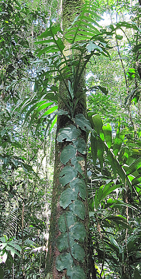 A vine-like juvenile trunk-climber opens into a large epiphyte. Volcan Arenal, Costa Rica. In context at